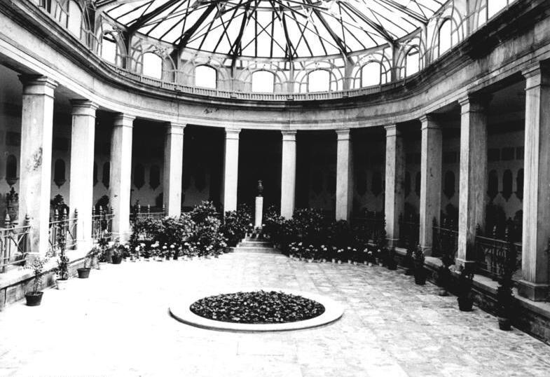 Gotha, Columbarium ADN-ZB Ludwig-9.8.84 Bezirk Erfurt: Das Columbarium auf dem Gothaer Hauptfriedhof mit der Urne Bertha von Suttners, einer der Vorkämpferinnen der Friedensbewegung.